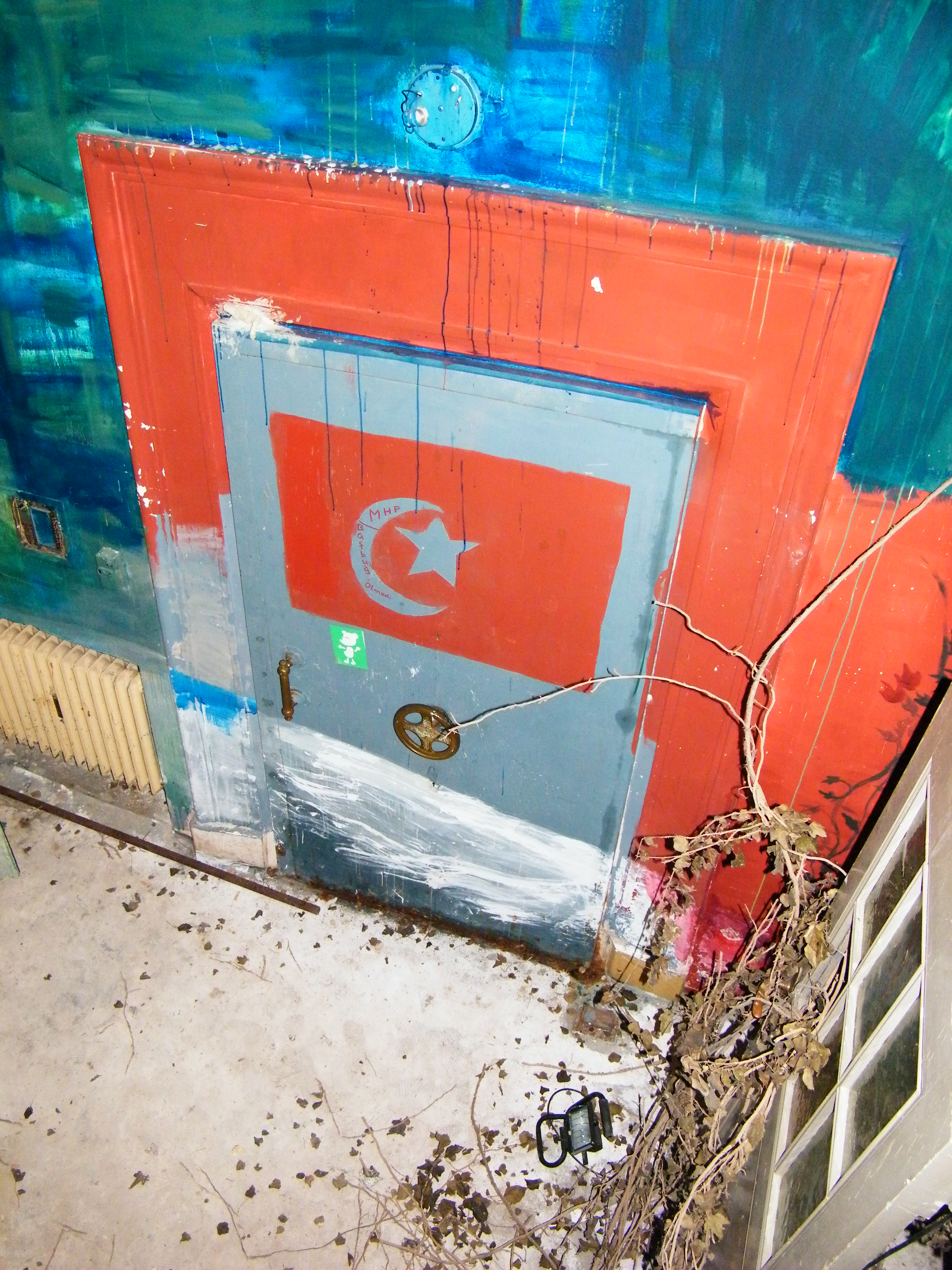 Künstlerhaus Kempten